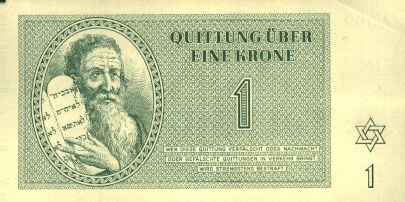 1 Krone banknote